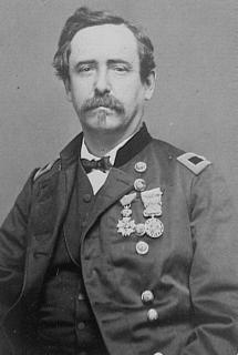 Gustave Cluseret (1823-1900)